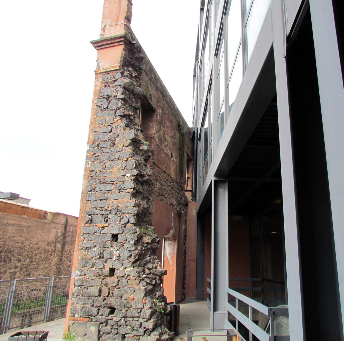 L'immagine è parte del File:Centro fieristico le Ciminiere.jpg già presente su Commons. Ilustra una sezione in cui coesistono la vecchia parete di un edificio consolidata e le strutture in acciaio del nuovo.